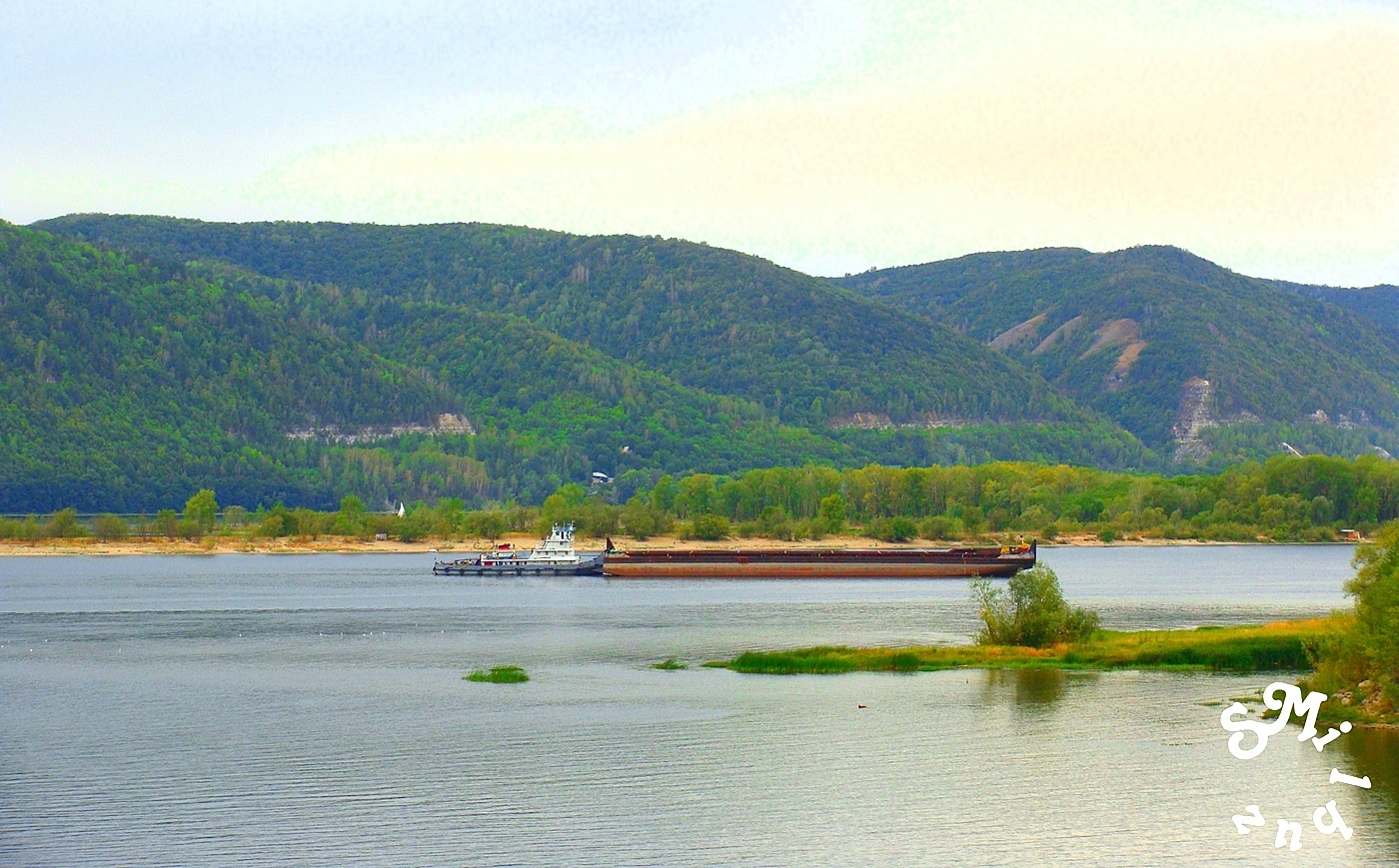 Жигулевские горы - панорама из устья реки Сок.